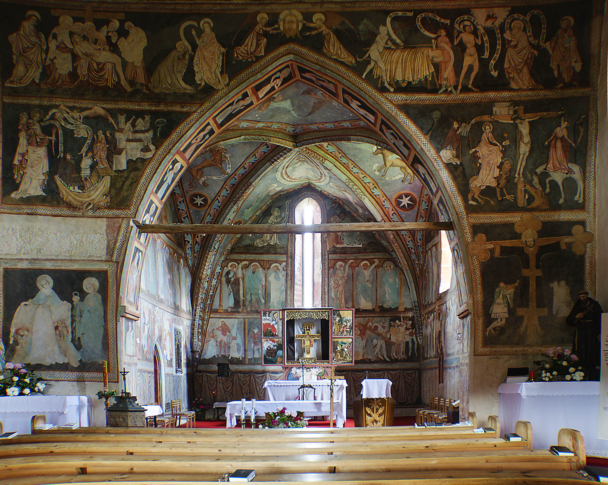 Stredoveký kostol sv. Františka z Assisi je vzácny klenot sakrálnej architektúry v strednej európe. V kostole je komplex vzácnych nástenných malieb z obdobia rokov 1380 - 1415